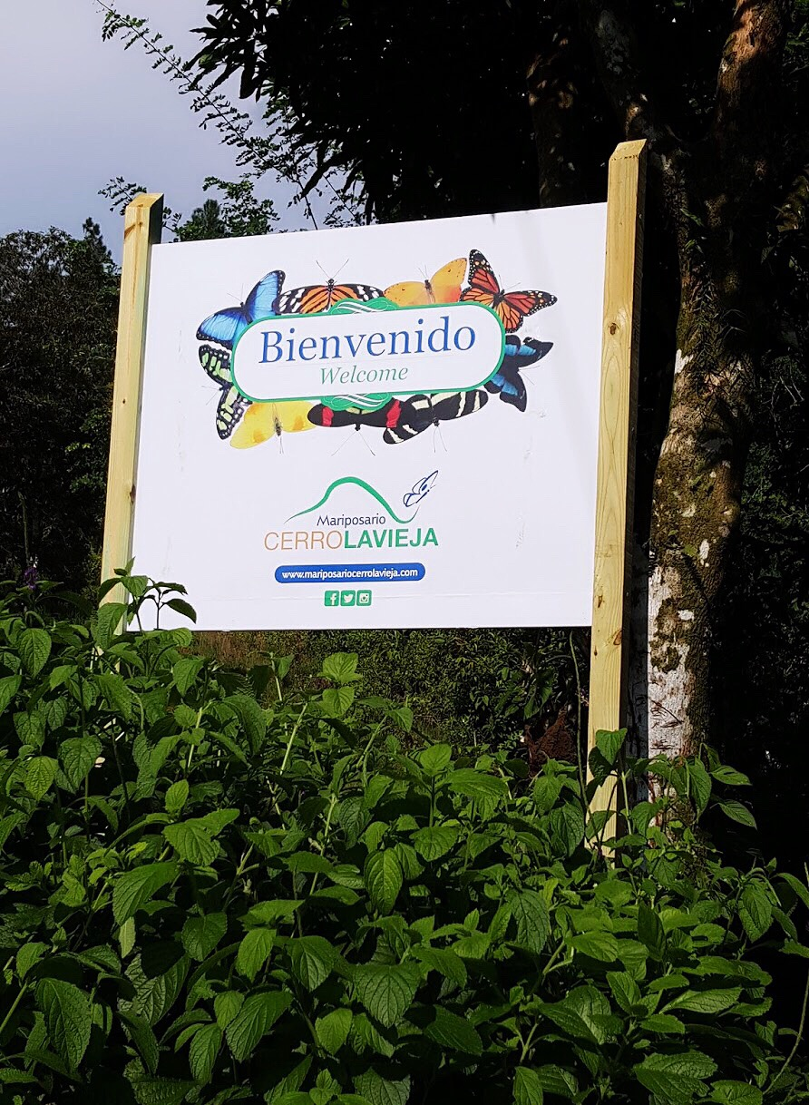 variedad de mariposas